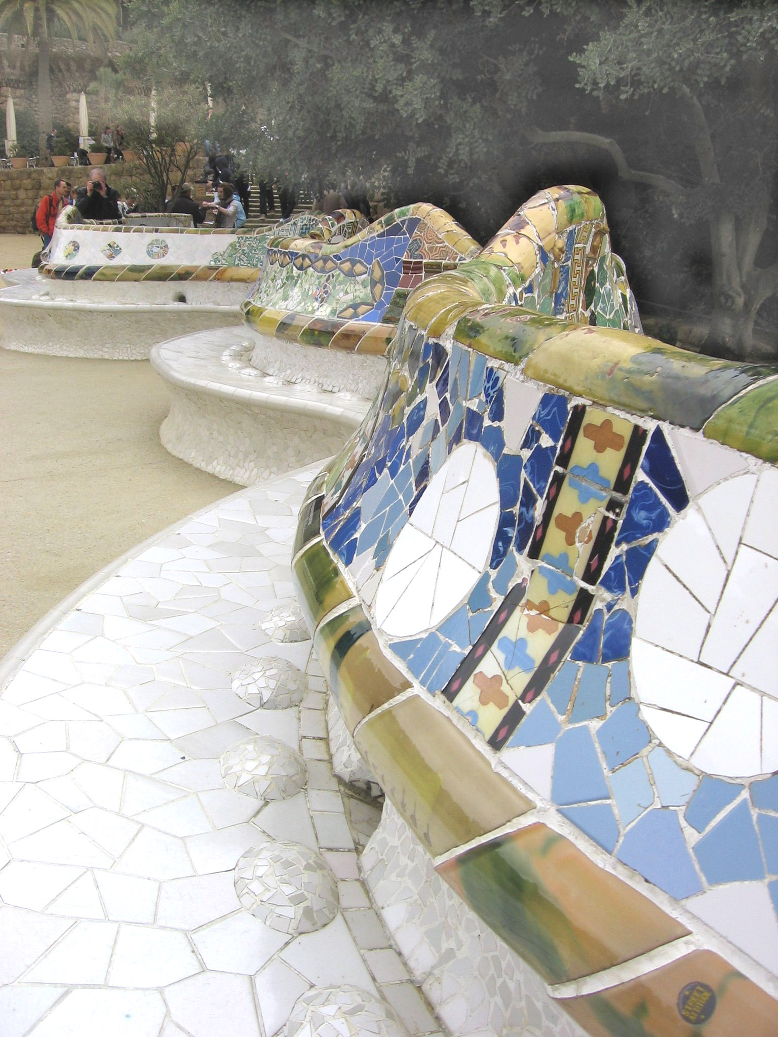 Parque Güell (Barcelona), de Antoni Gaudí